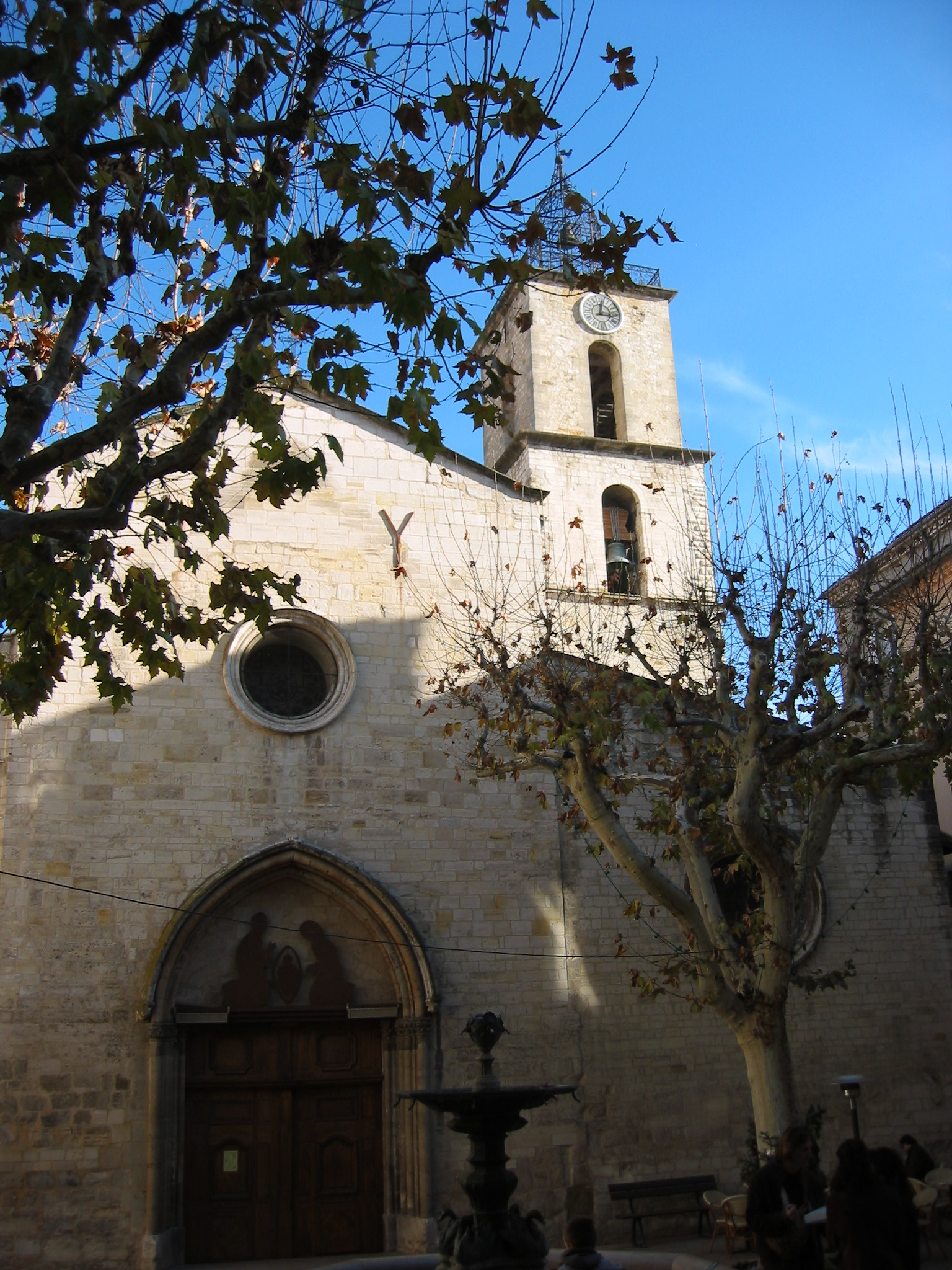 Eglise Saint-Sauveur, France , Manosque, Provence, France